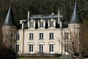 Château de Moncé - Limeray - Indre et Loire - France 19ème siècle